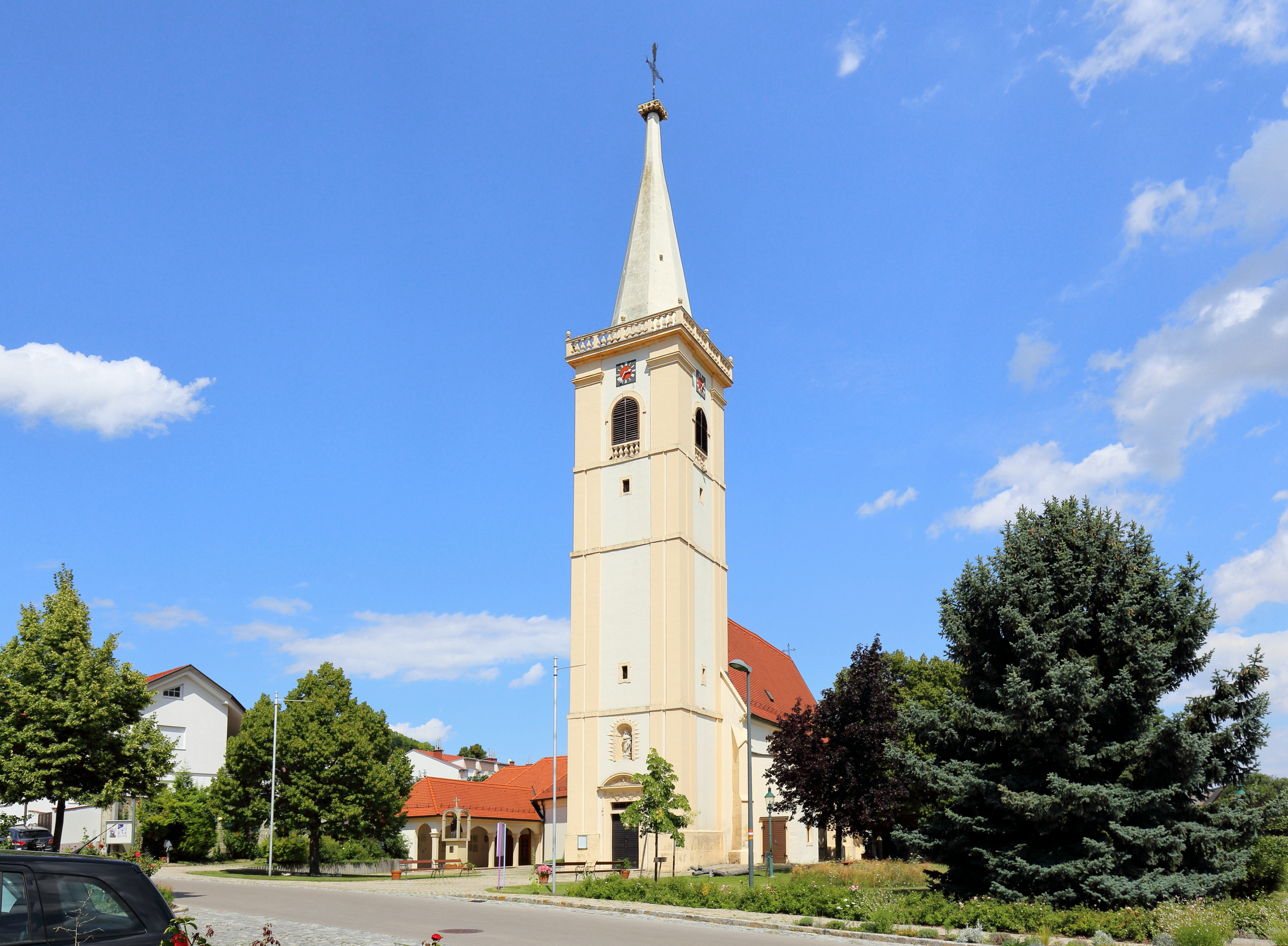 Die spätgotische röm.-kath. Pfarrkirche hl. Johannes d. Täufer mit Kirchplatz in der burgenländischen Marktgemeinde Großhöflein. Der vorgelagerte, viergeschossige Westturm mit Lisenengliederung wurde 1675 angebaut.